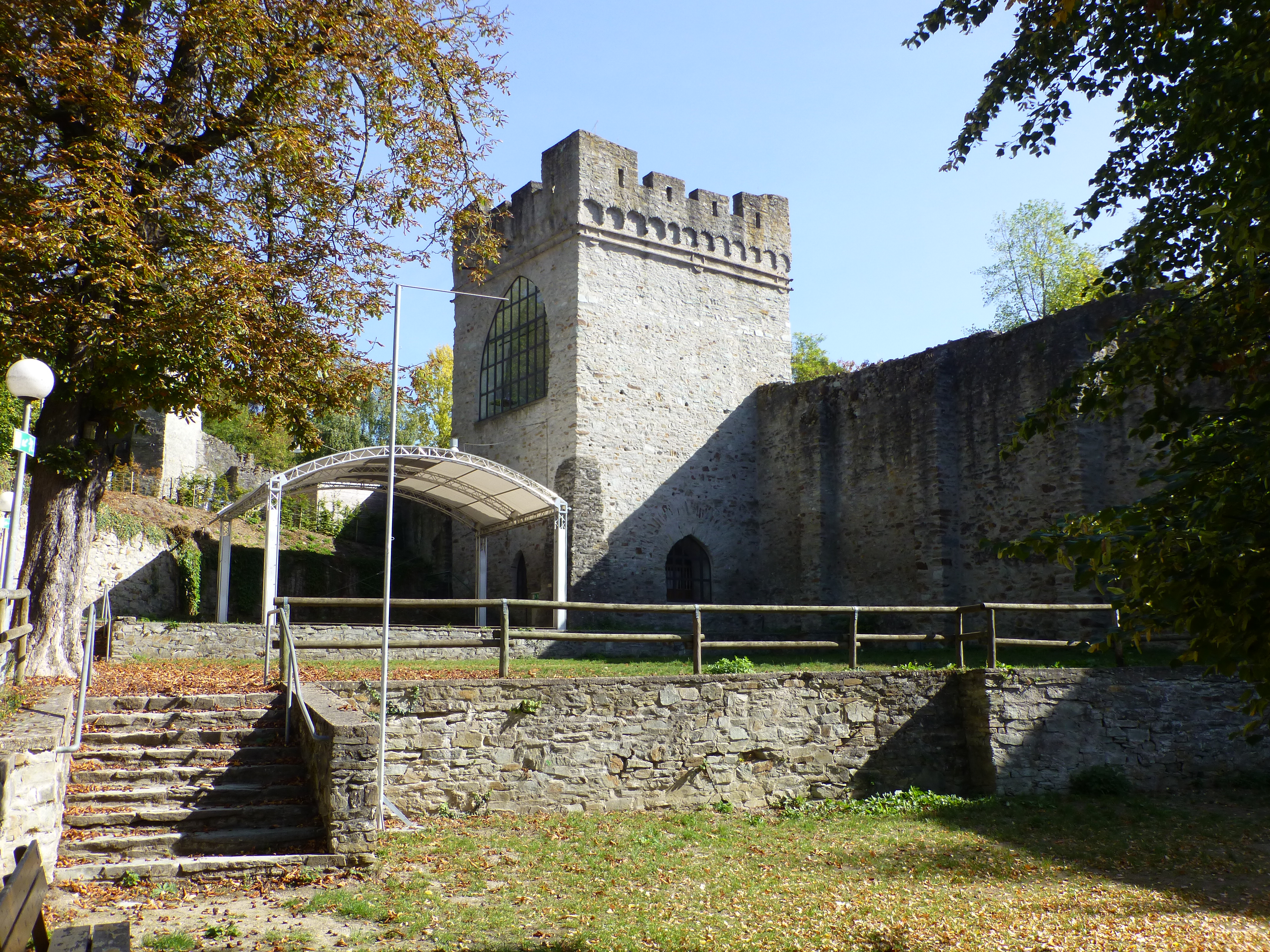 Kapellenturm der Burg Sonnenberg an der Burgmauer der unteren Burg